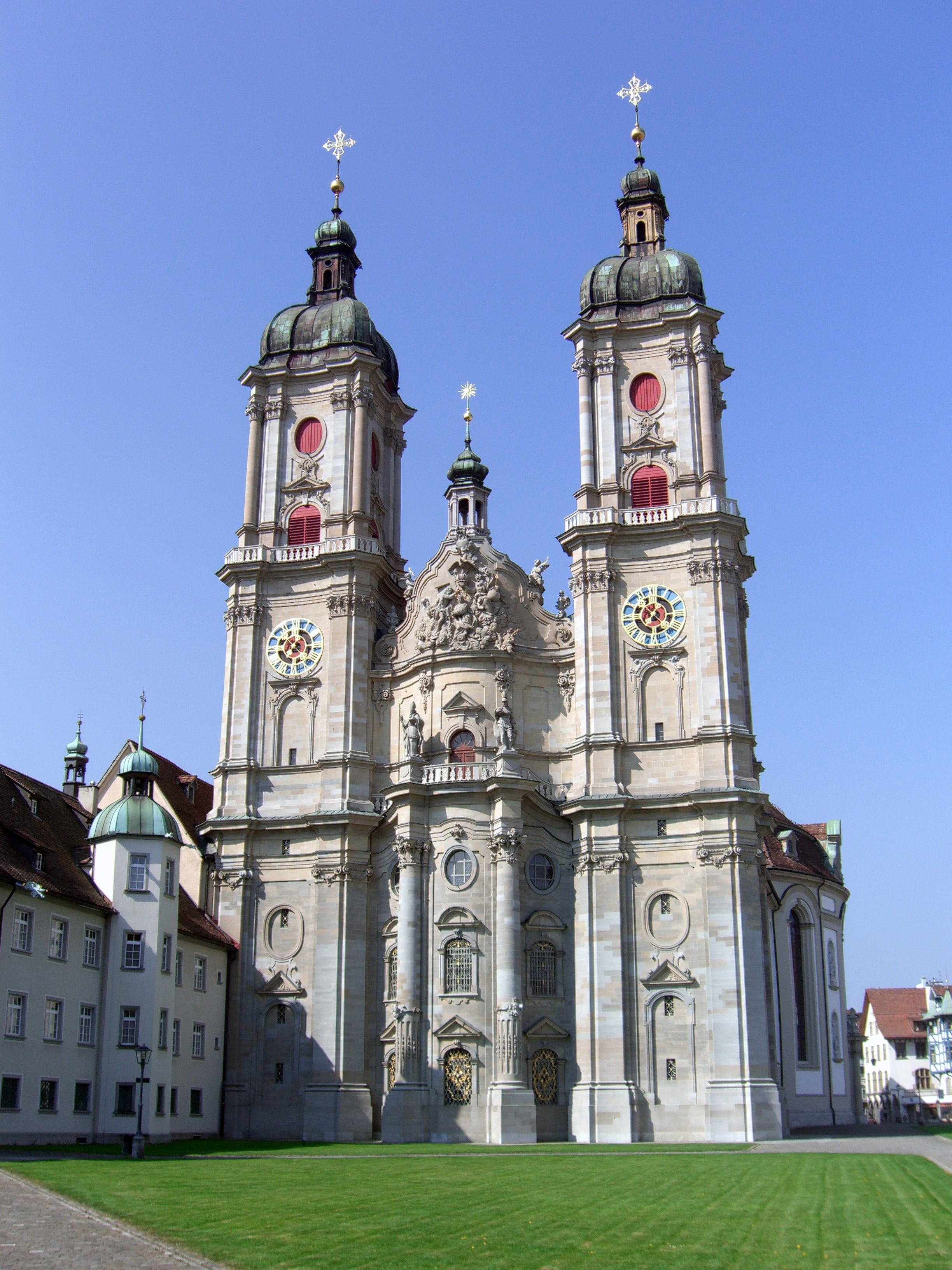 Stiftskirche in St. Gallen